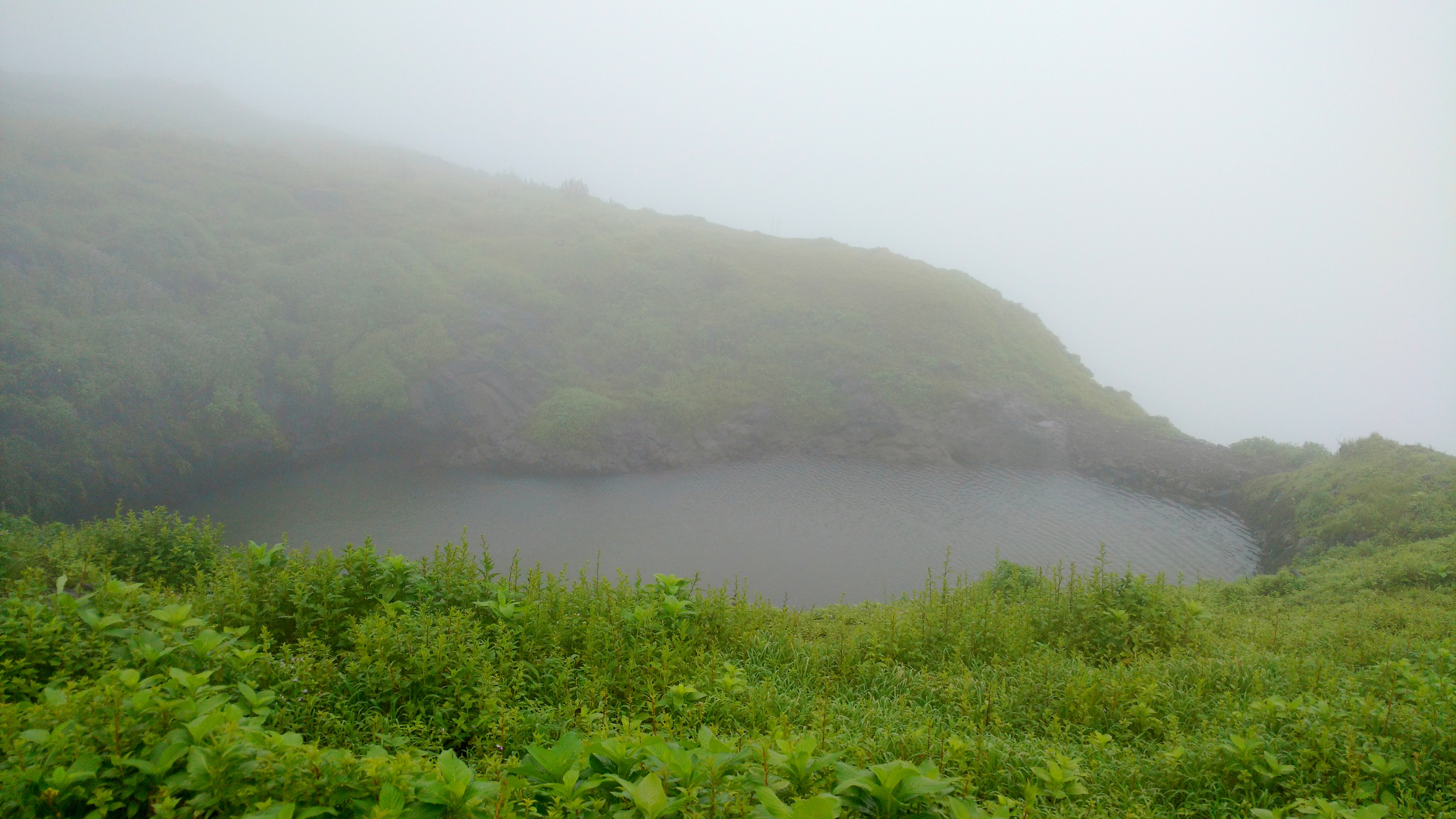 Kenjalgad Fort; Water tank